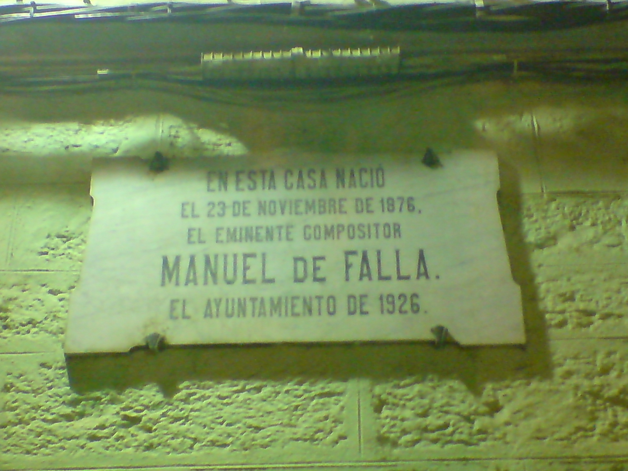 ManueldeFallaTafel